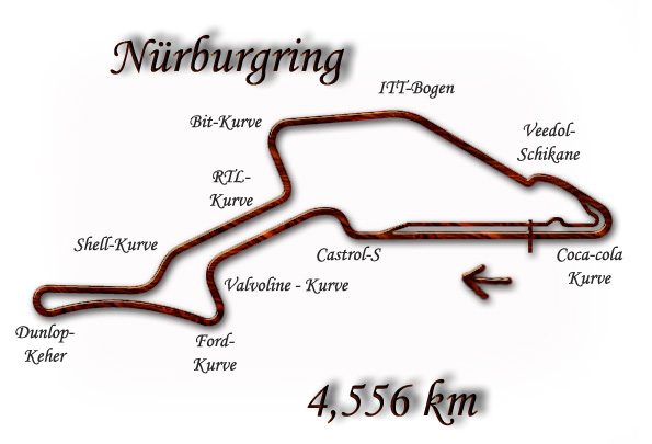 Plánek trati Nurburgring 1995 - 2001.